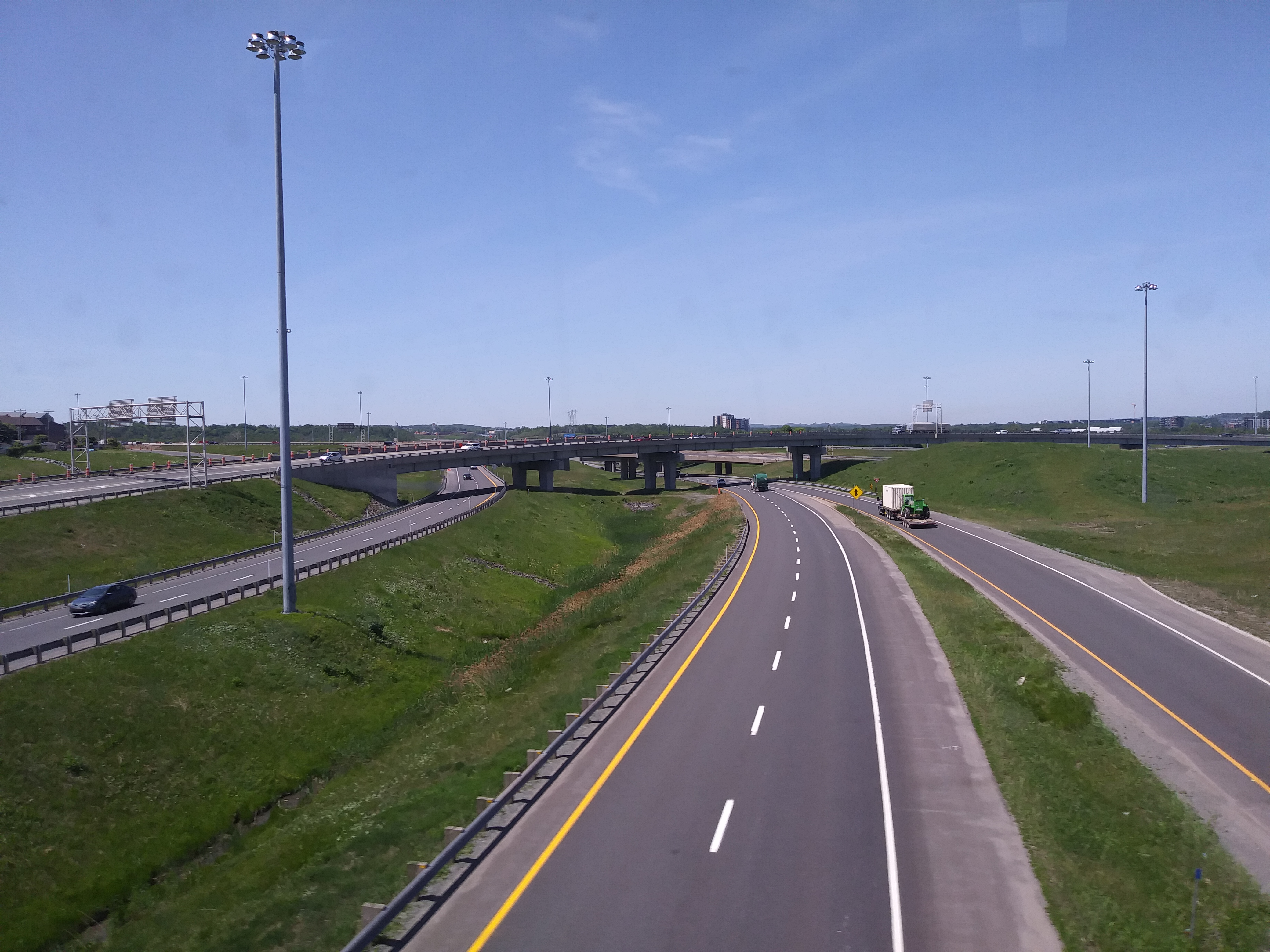 Autoroute Jean-Lesage (20) près de l'autoroute Robert-Cliche (73) à Charny (Lévis) vue du train